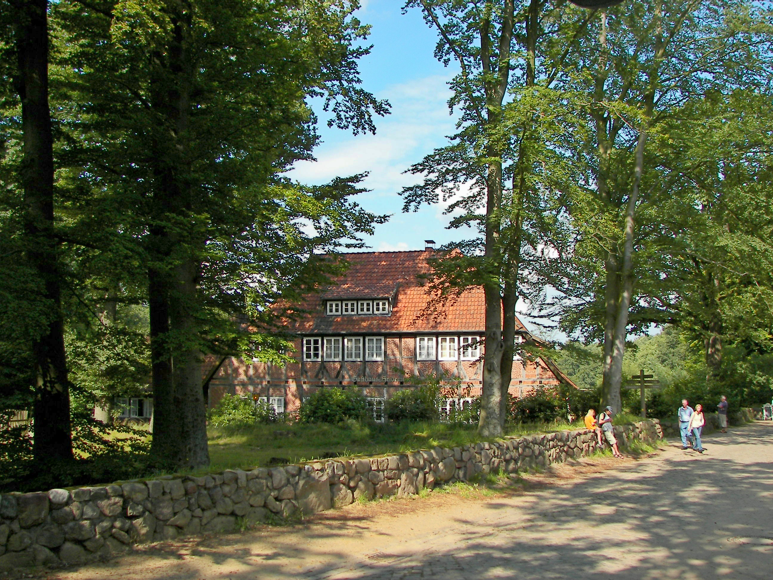 Wilsede, Gasthaus Heidemuseum